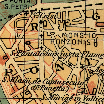 Pianta di Hülsen